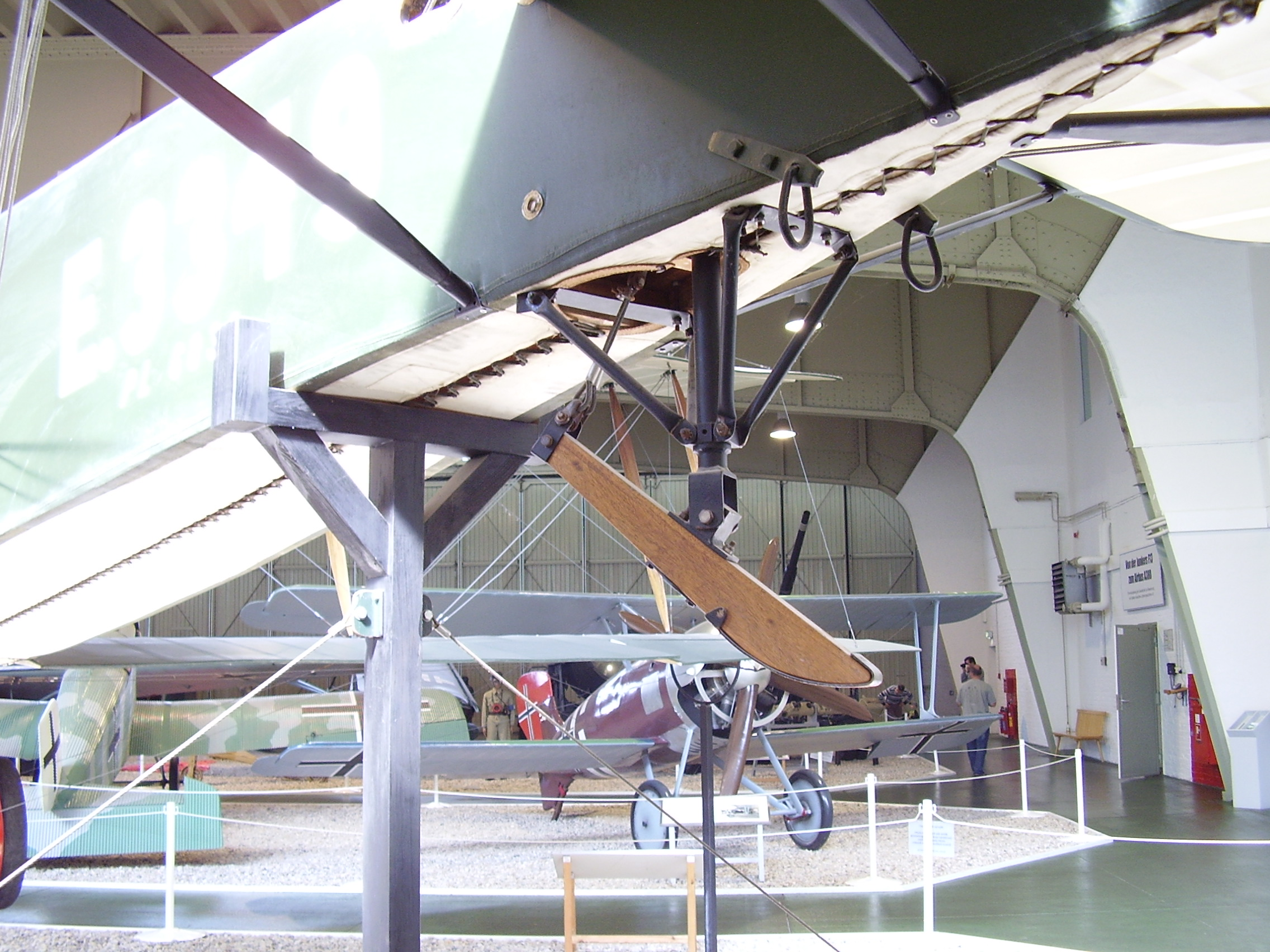 Luftwaffenmuseum der Bundeswehr; Airforce Museum of the Bundeswehr; Berlin-Gatow